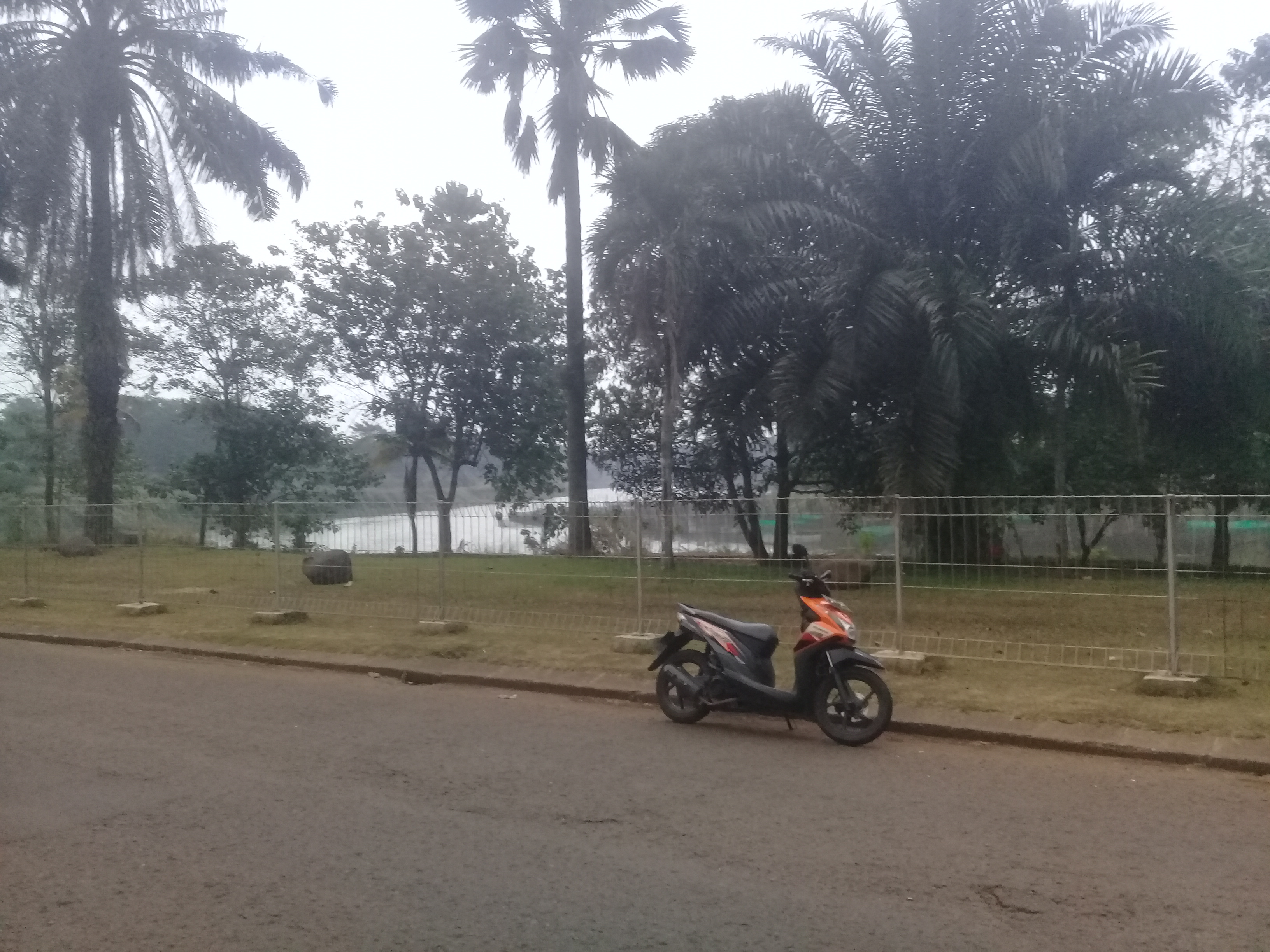 Wisata Situ Cilala